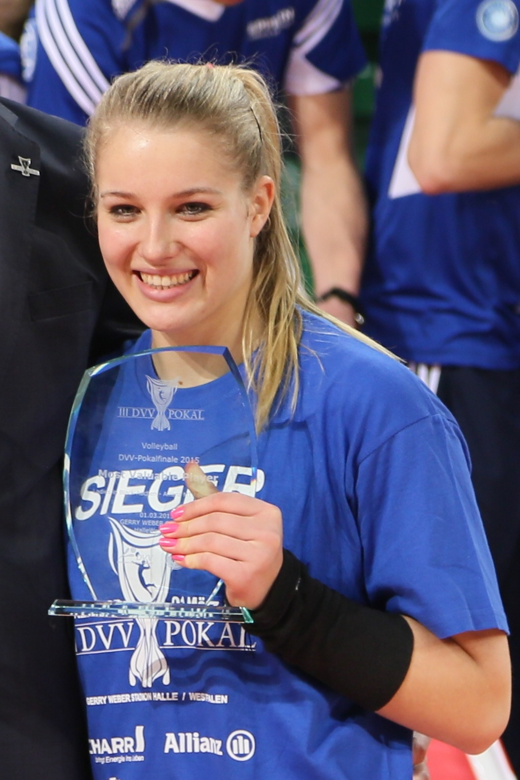 Jelena Wlk - MVP beim DVV-Pokalfinale 2015 in Halle (Westfalen)